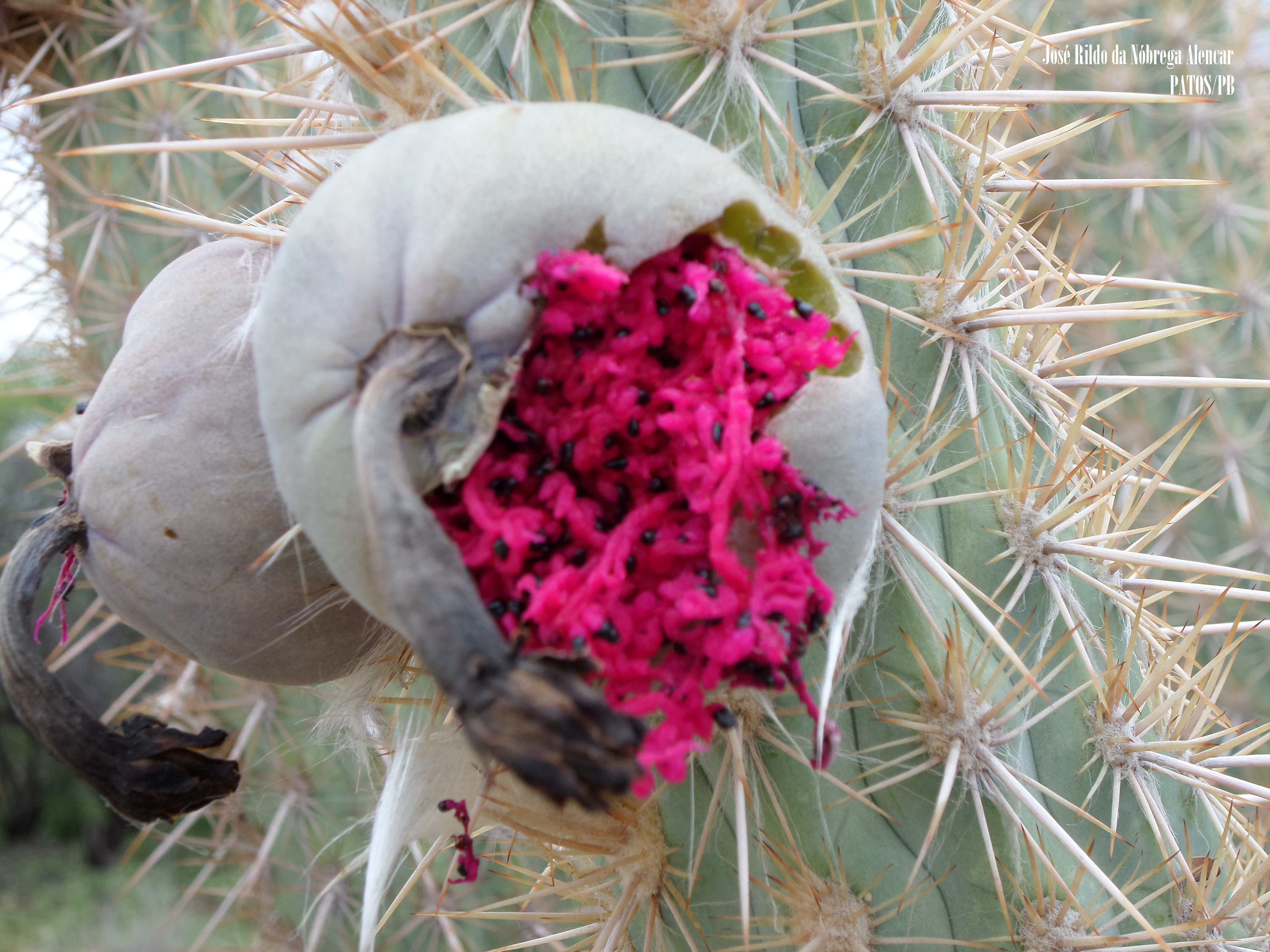 XIQUE-XIQUE (Pilosocereus polygonus)